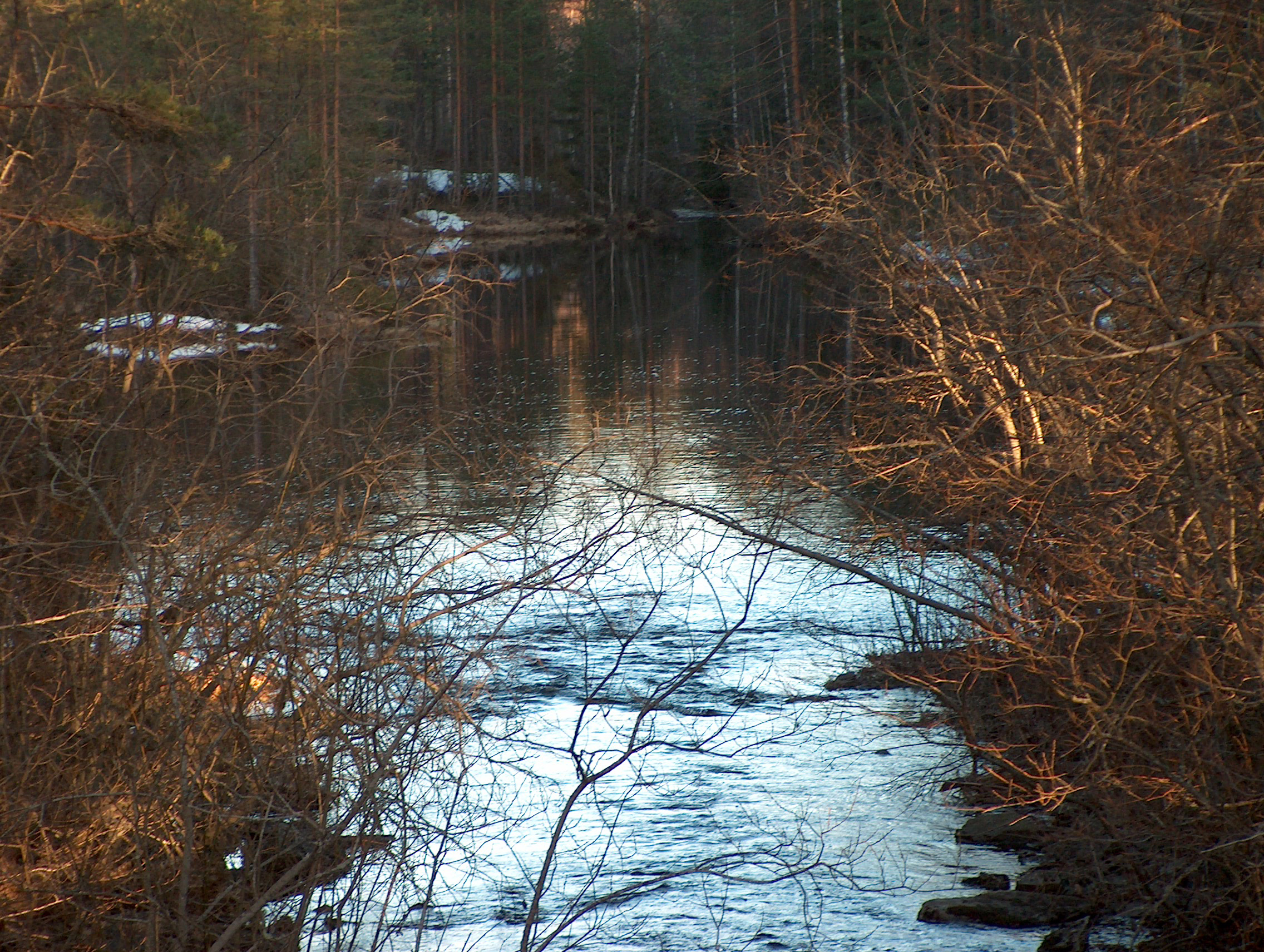 Breivannselva (elvestrekningen mellom Breivannet og Langvannet)